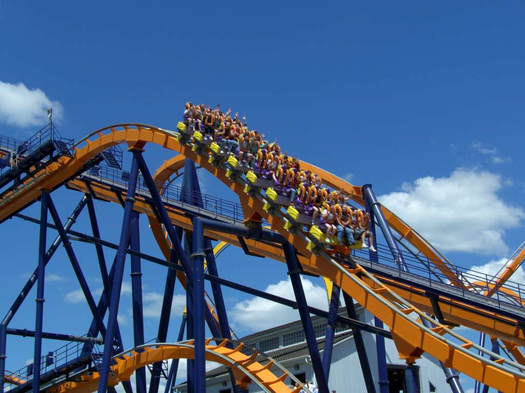 Dominator , montagnes russes à Kings Dominion